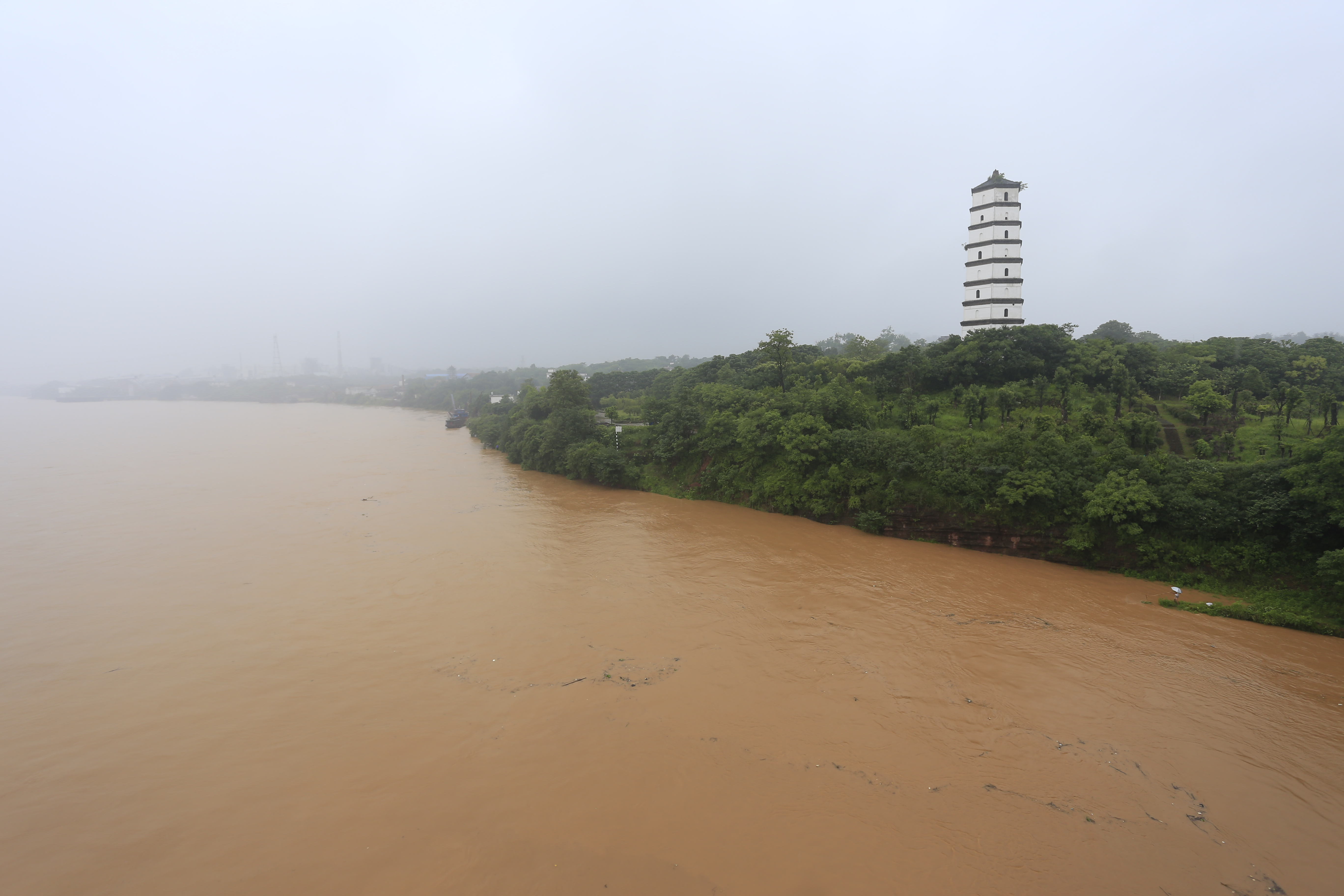 赣州玉虹塔